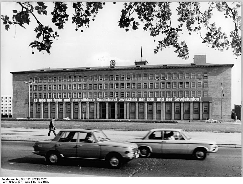 Berlin, Marx-Engels-Platz, Gebäude des Zentralkommites der SED ADN-ZB Schneider Gow.-Schä 15.7.1974 Berlin: Haus des Zentralkomitees der Sozialistischen Einheitspartei Deutschlands, Am Marx-Engels-Platz